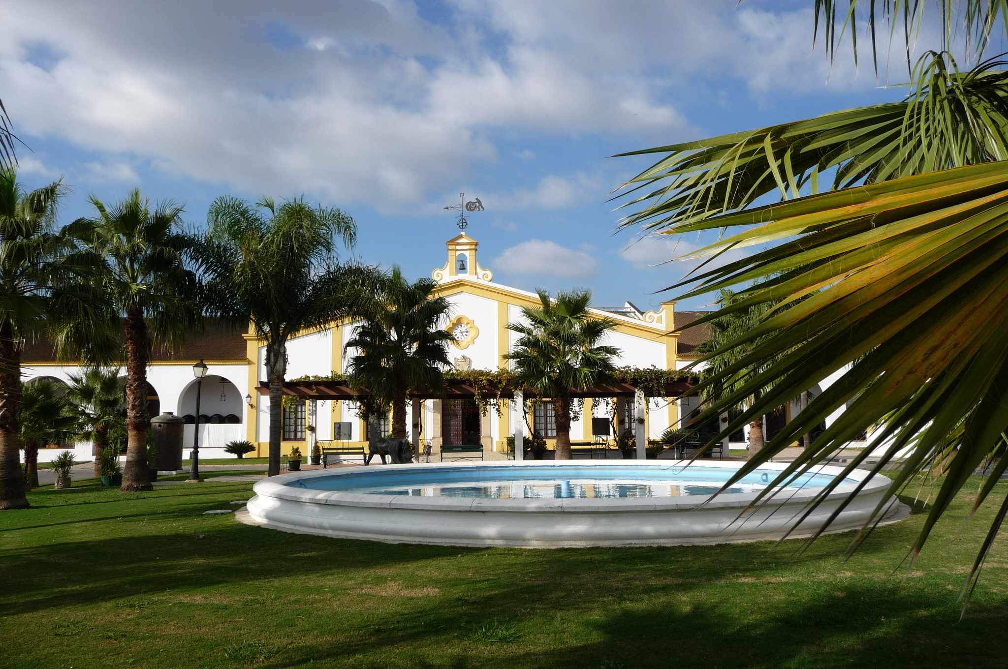 Bodegas Real Tesoro. Jerez de la Frontera (Andalusia, Spain).